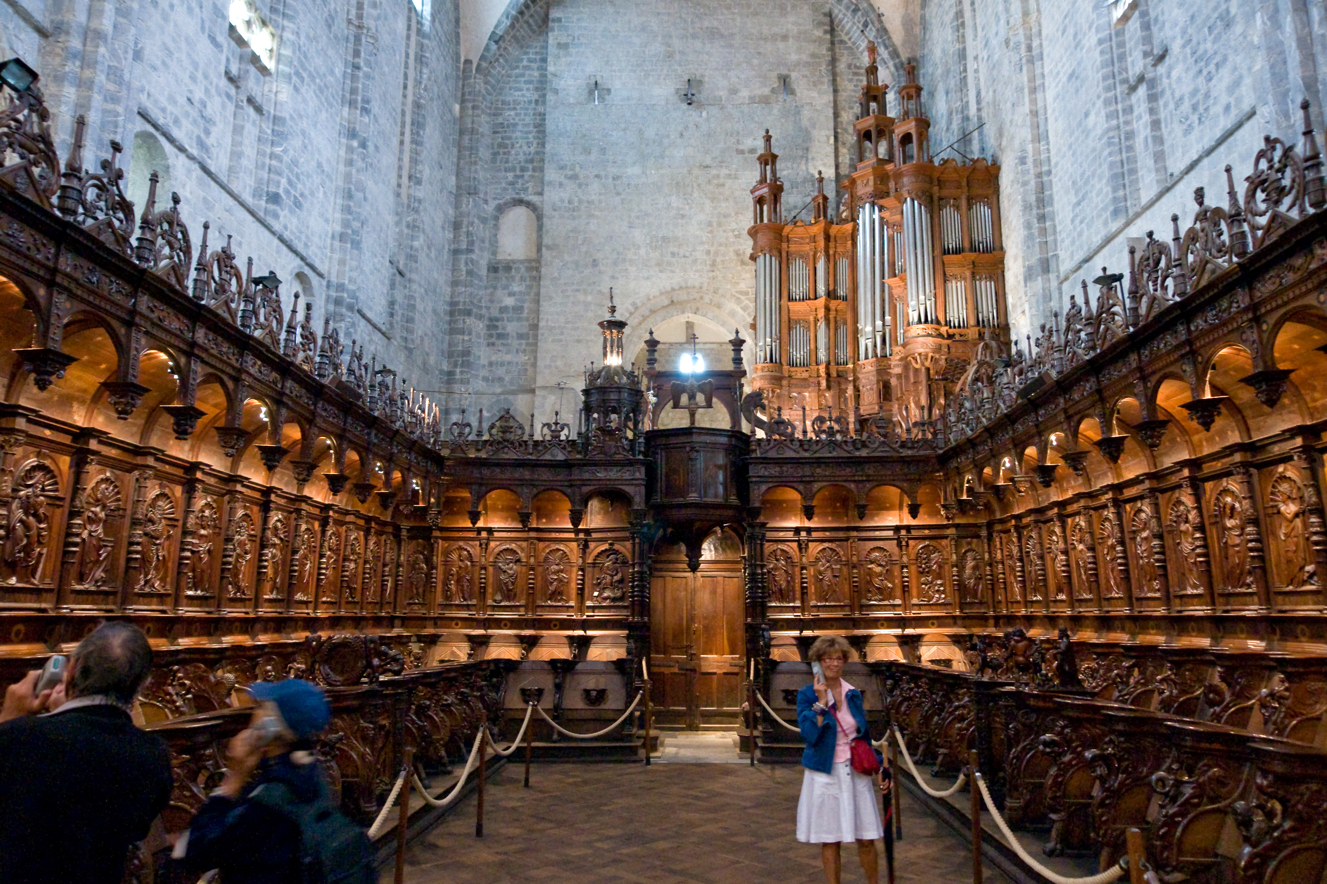 Eglise en bois incluse dans la cathédrale Saint Bertrand de Comminges